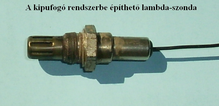 Gépkocsi kipufogórendszerébe építhető lambda-szonda (oxigénszenzor) Saját felvétel, 09.05.2005. Szerző: Dr. Báder Imre